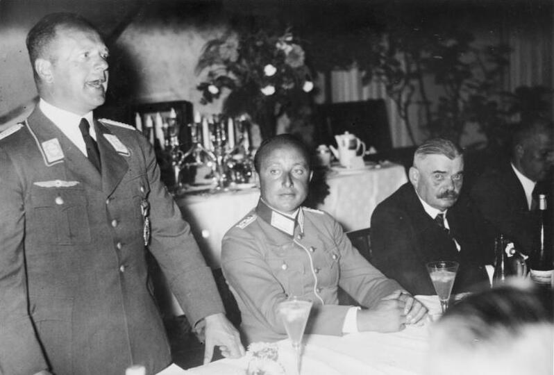 Scherl: Ehrung der Deutschen Teilnehmer am Europa Flug 1934 im Flugverbandshaus [in Berlin] Staatssekretär Milch bei seiner Ansprache. v.l.n.r.: Staatssekretär Milch, Hauptmann Seidemann, Maj. v. Kehler. 36149-34